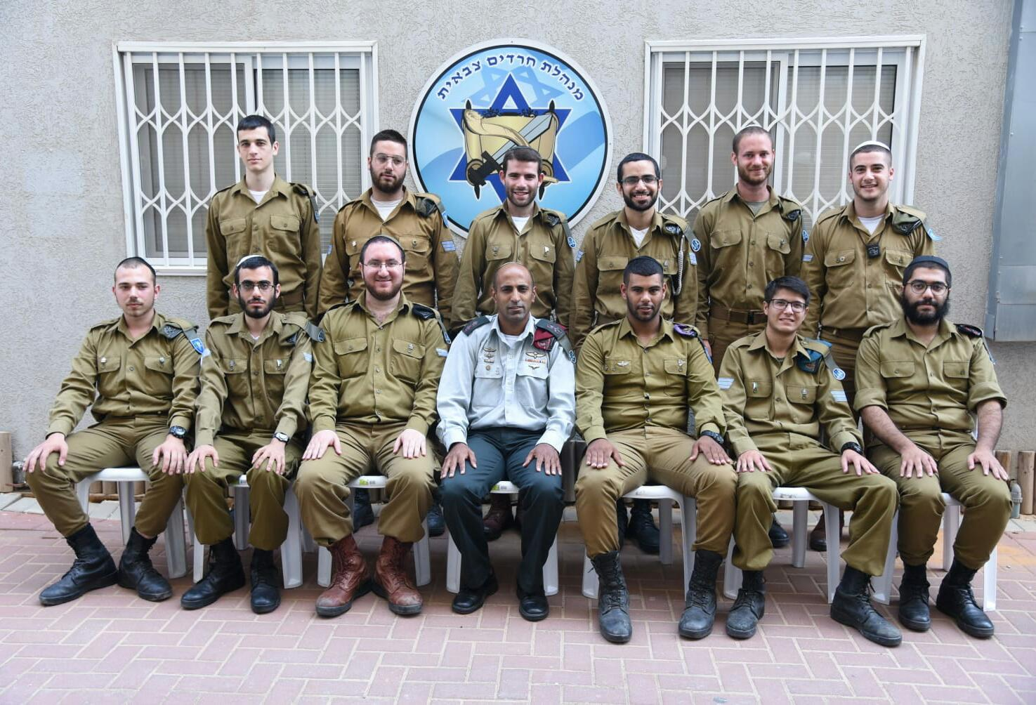 טקס מצטייני ראש מנהלת החרדים הצבאית לראש השנה תש"ף.